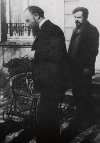 Эрик Сати и Клод Дебюсси у дверей дома Дебюсси на улице Булонского Леса в Париже